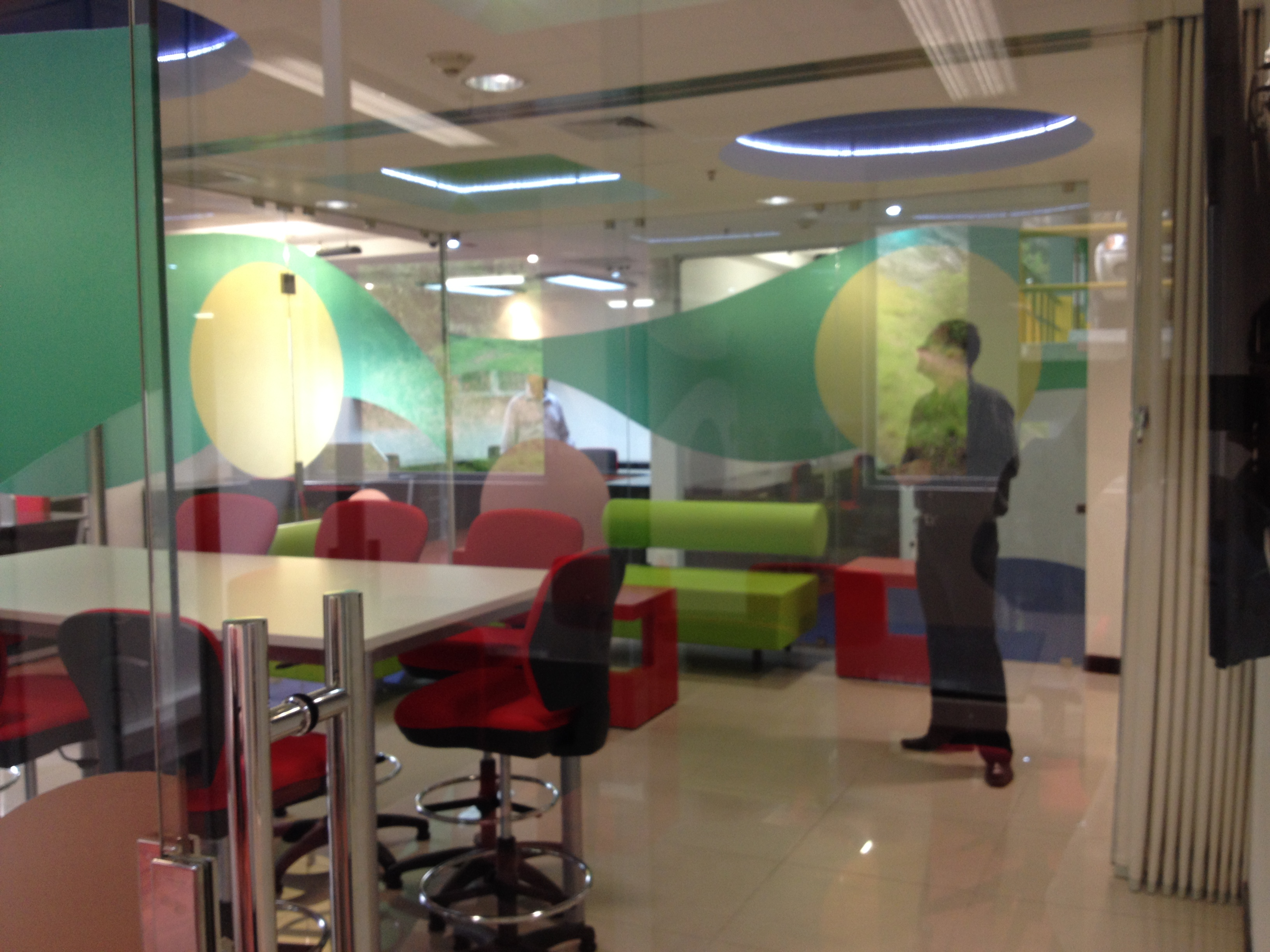 Aplicación de principios de arquitectura cuántica en una institución pública de telecomunicaciones